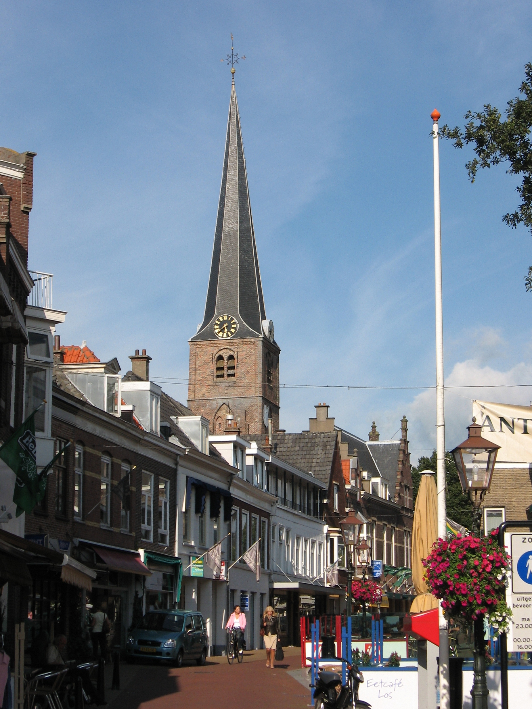 Oude Kerk, Rijswijk